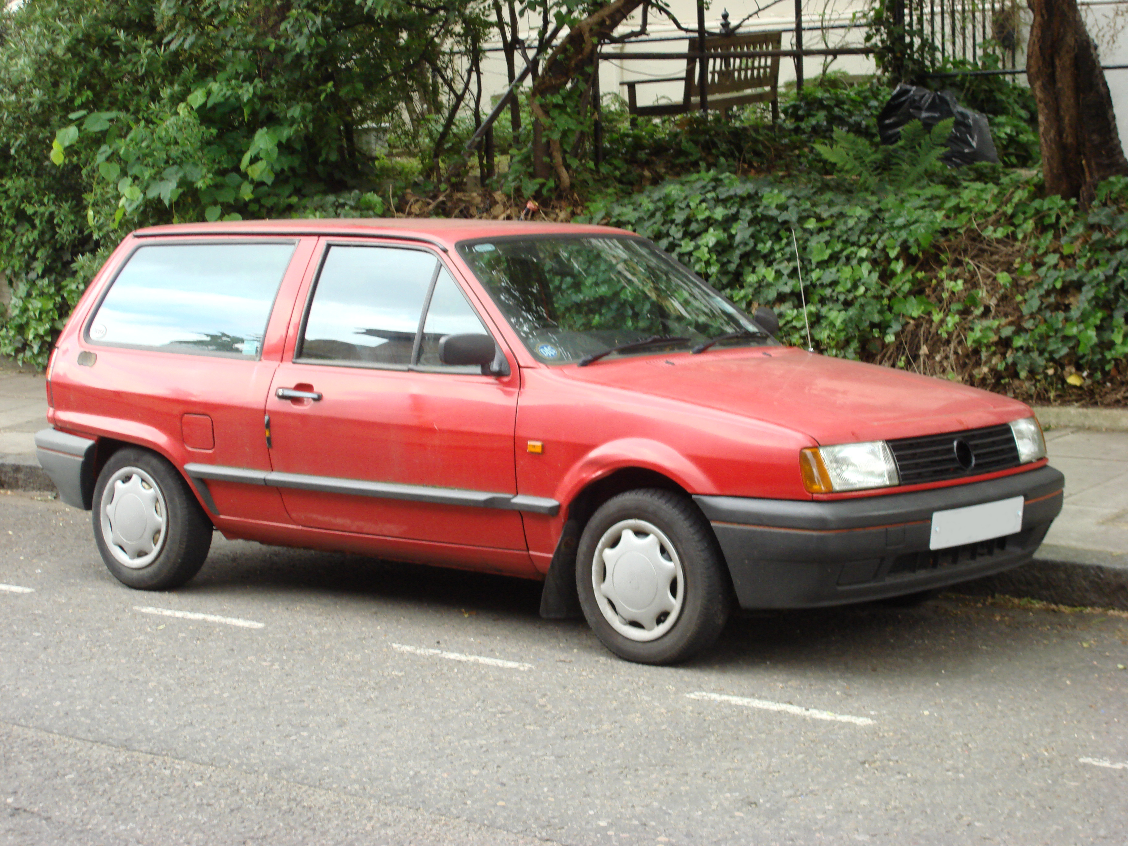 Volkswagen Polo